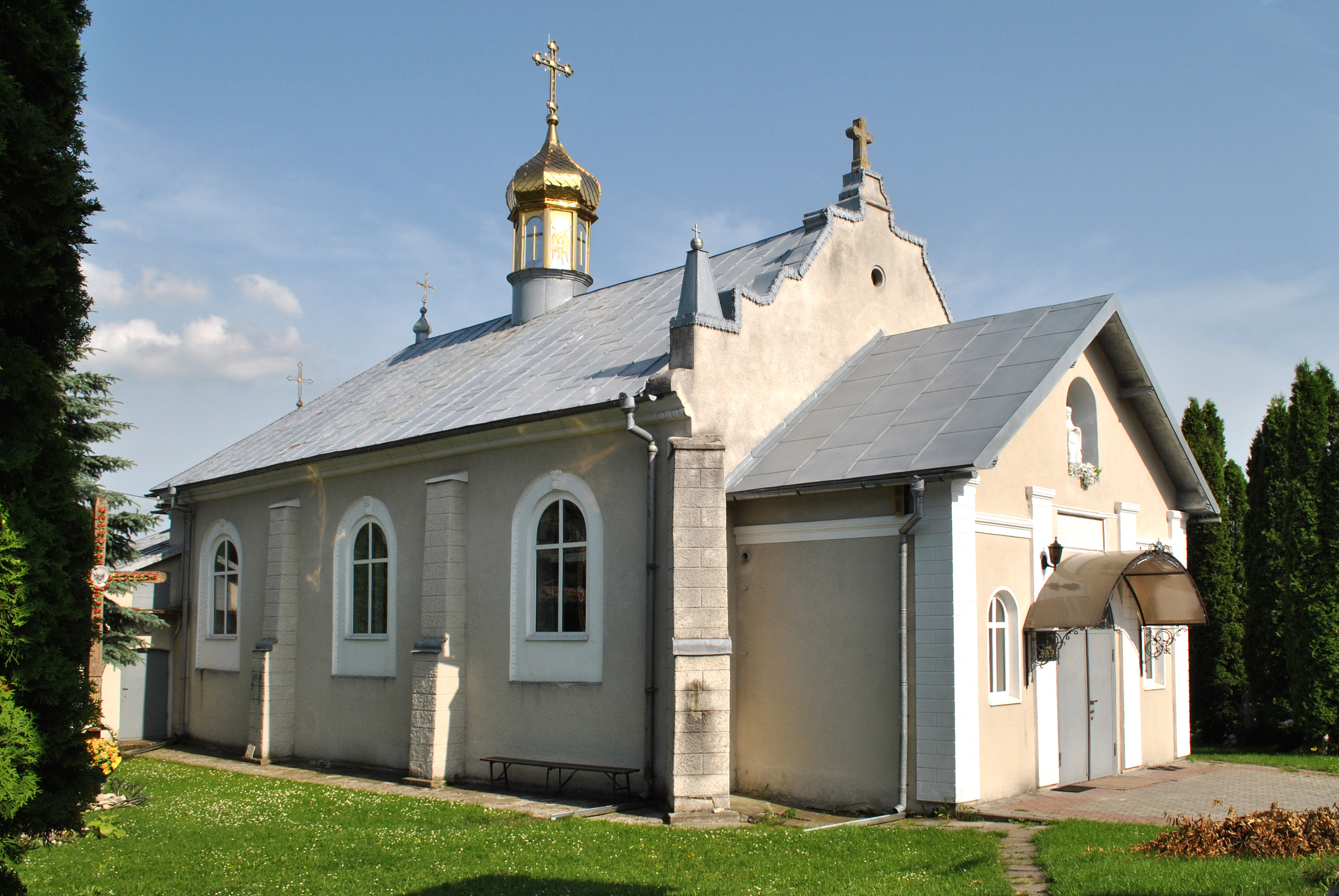 Покрови Пресвятої Богородиці в мікрорайоні Кутківці м. Тернополя.